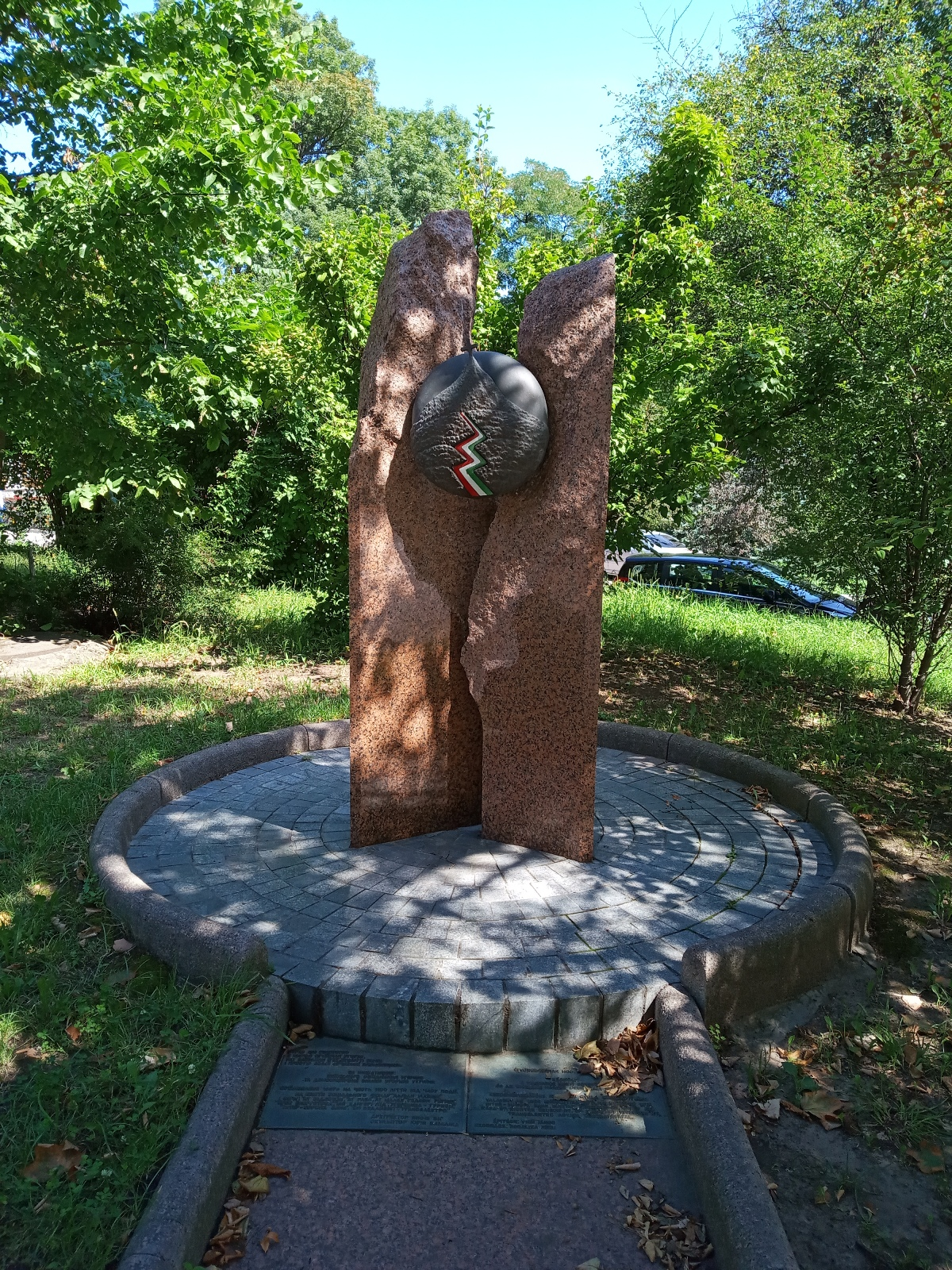 фотографія